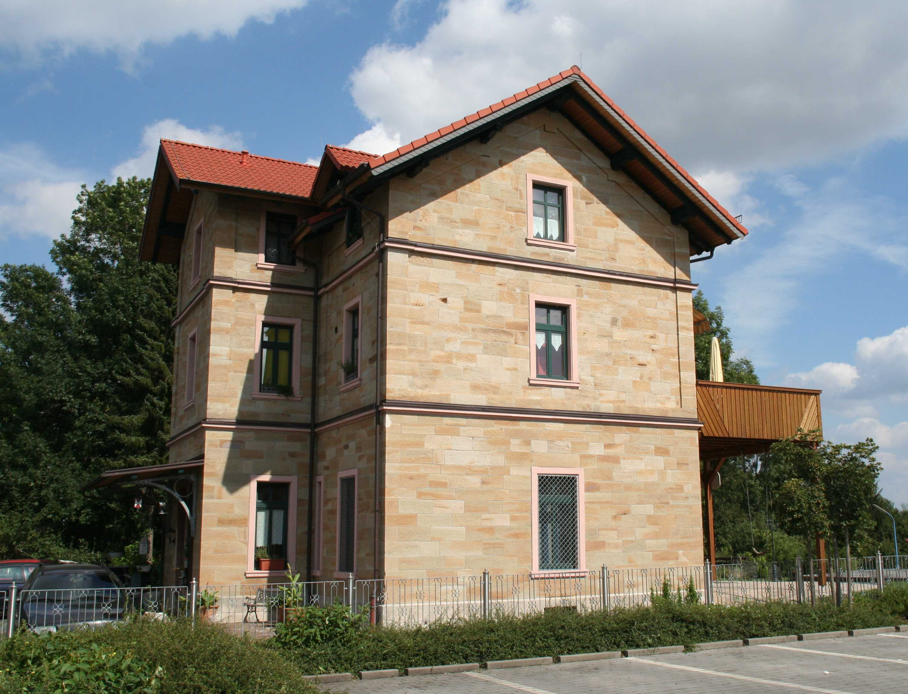 Bahnhof Bad Königshofen im Grabfeld im Landkreis Rhön-Grabfeld in Bayern